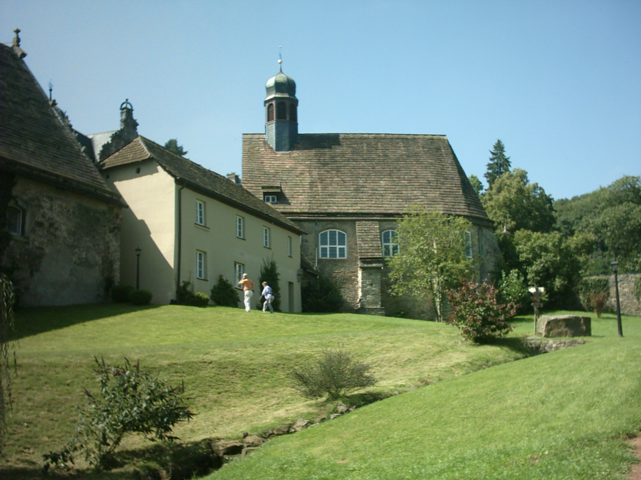 Pfarrkirche Hämelschenburg Fotograf: presse03, selbst fotografiert 8/2005 Lizenz: GNU-FDL